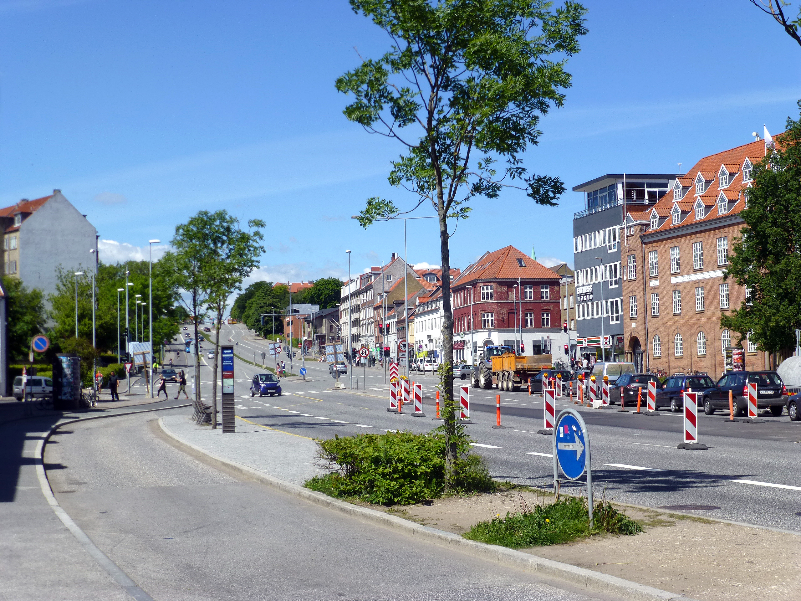 Nørreport set mod nord